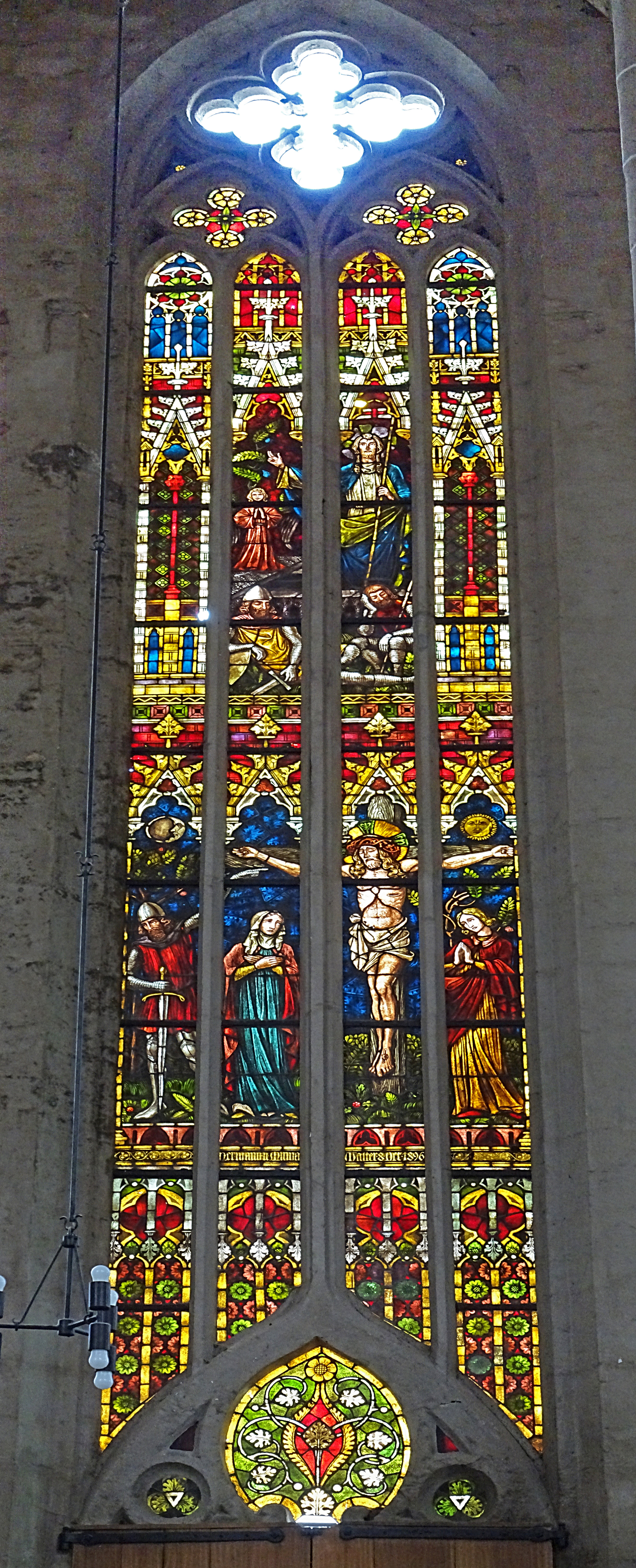 Buntglasfenster über dem Nord-Portal im Langhaus der Divi-Blasii-Kirche (Mühlhausen, Thüringen)